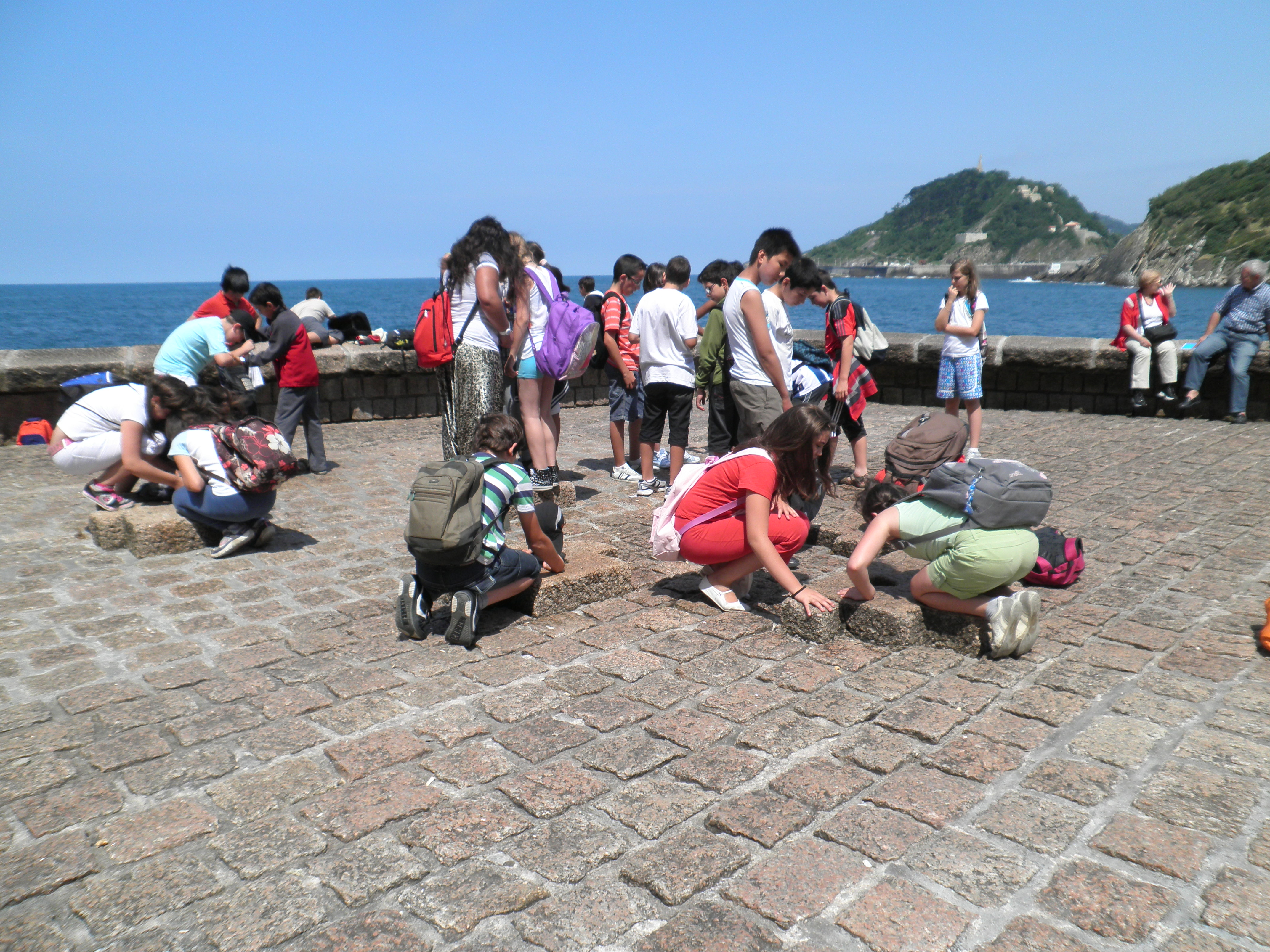 Haizearen orrazian haurrak jolasten.